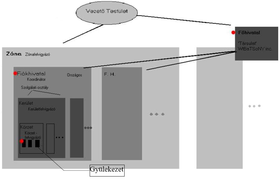 Jehova tanúi hierarchiája